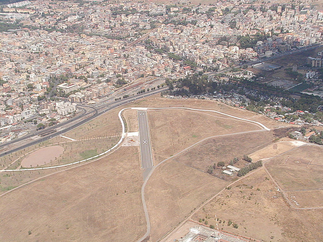 Bild des ehemaligen Flughafen Rom-Centocelle